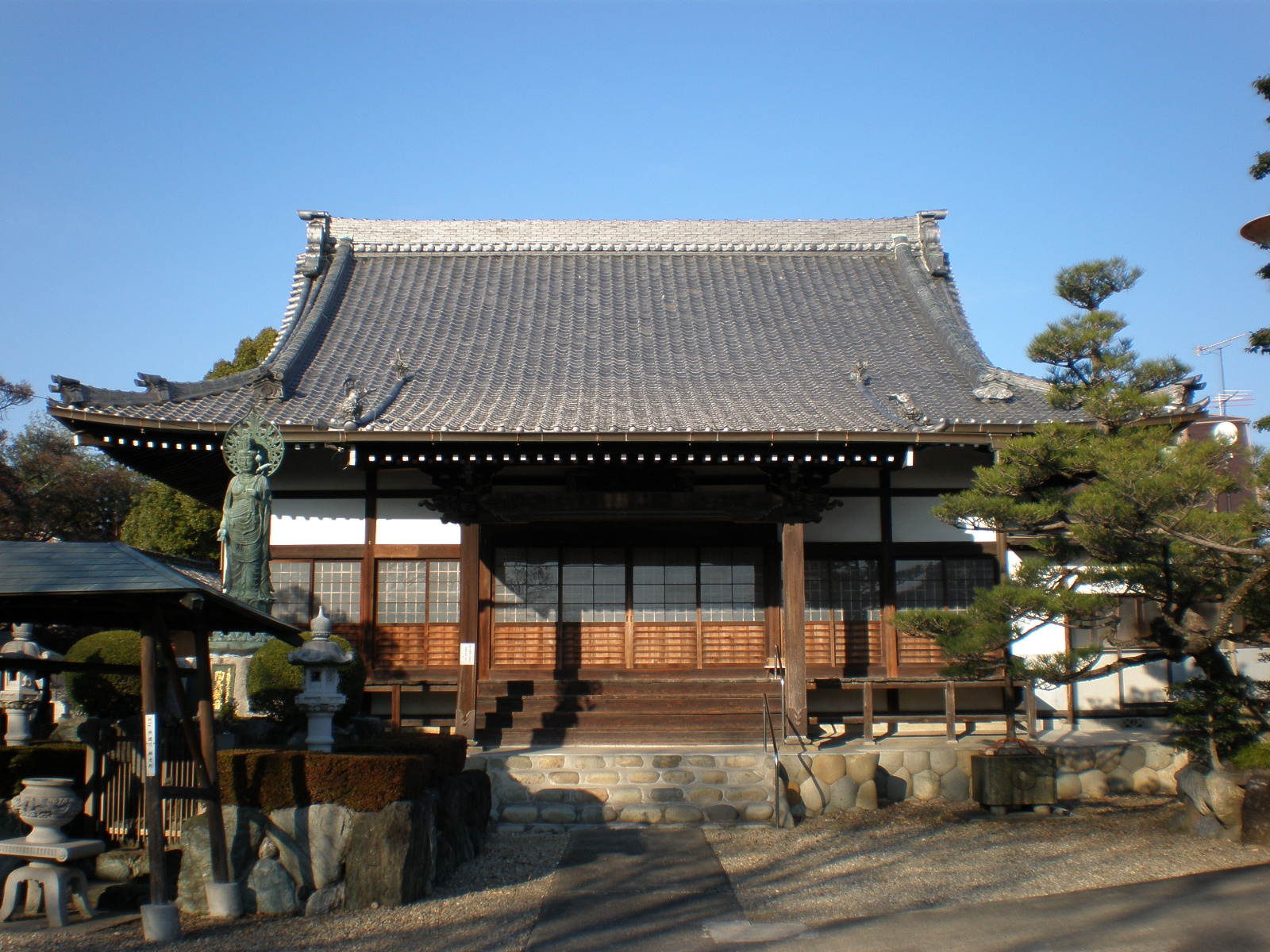 愛知県小牧市にある陶昌院の本堂